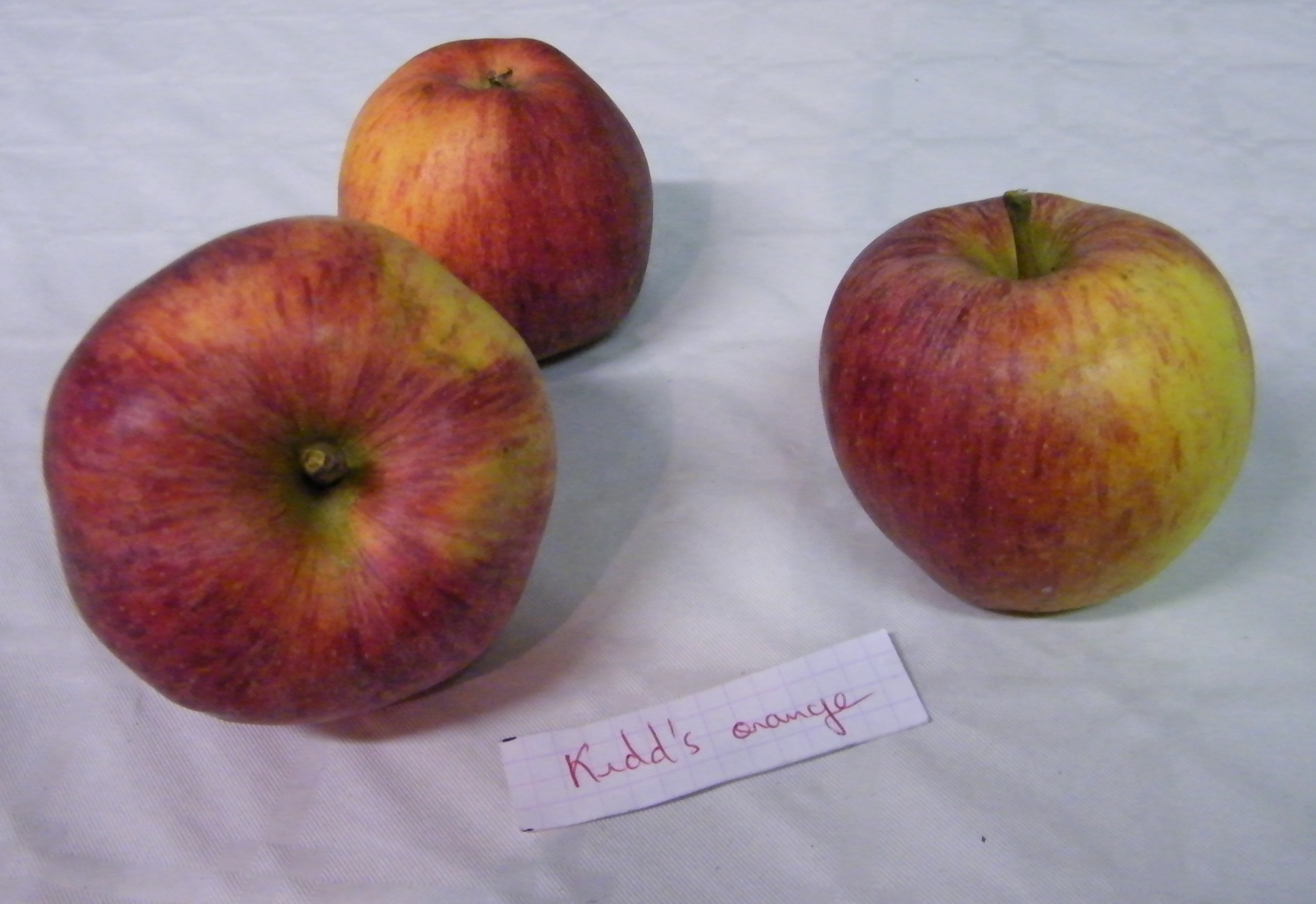 Kid's orange, Mons-Boubert, Somme, Fr